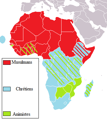 Répartition des principales religions en Afrique